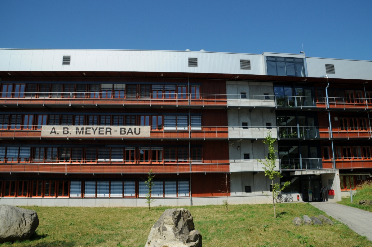 Senckenberg Naturhistorische Sammlungen Dresden (Staatliche Naturhistorische Sammlung Dresden), Sachsen, Deutschland